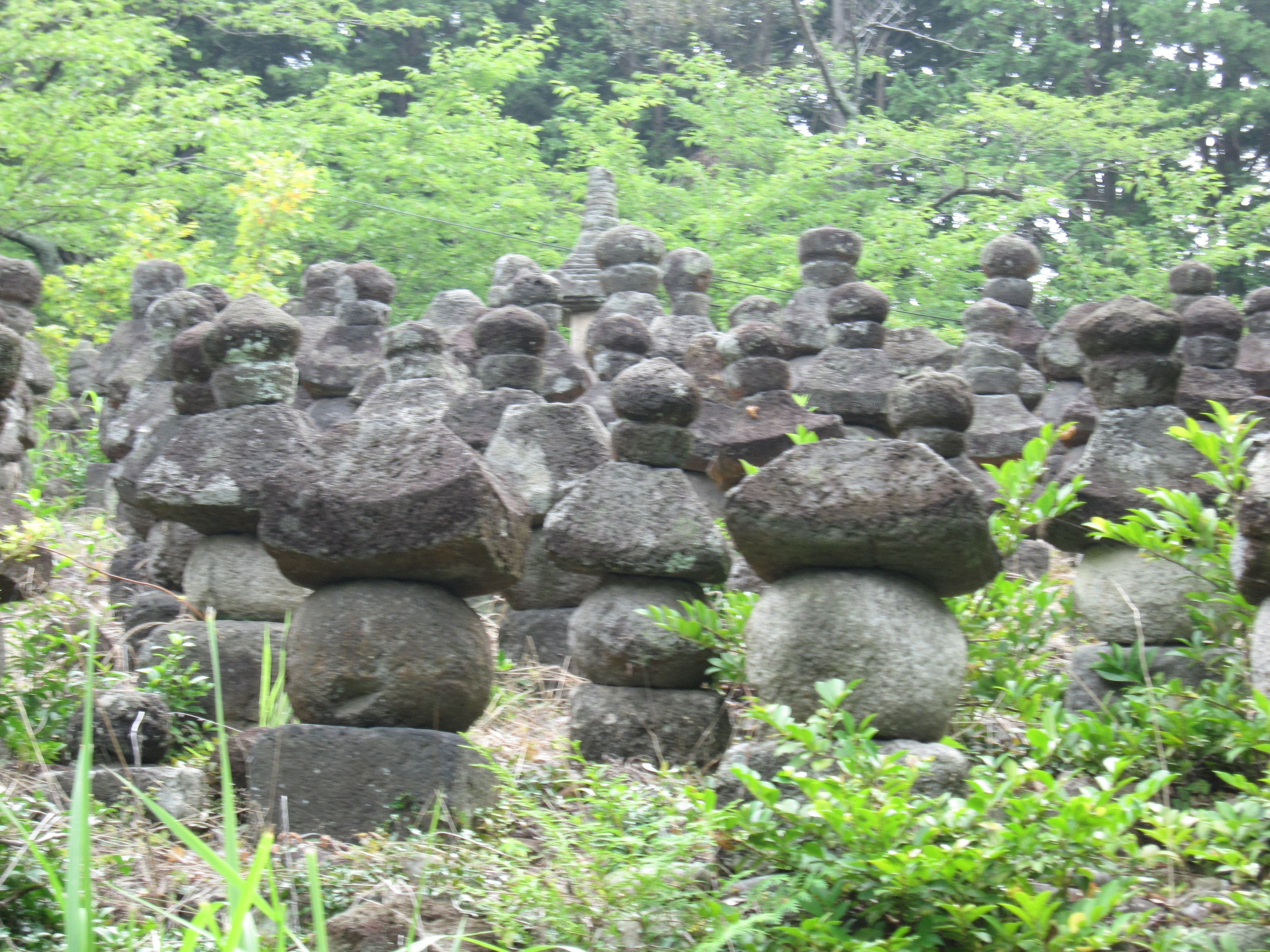 長綱寺（鳥取県西伯郡大山町名和）にある名和一族郎党の墓